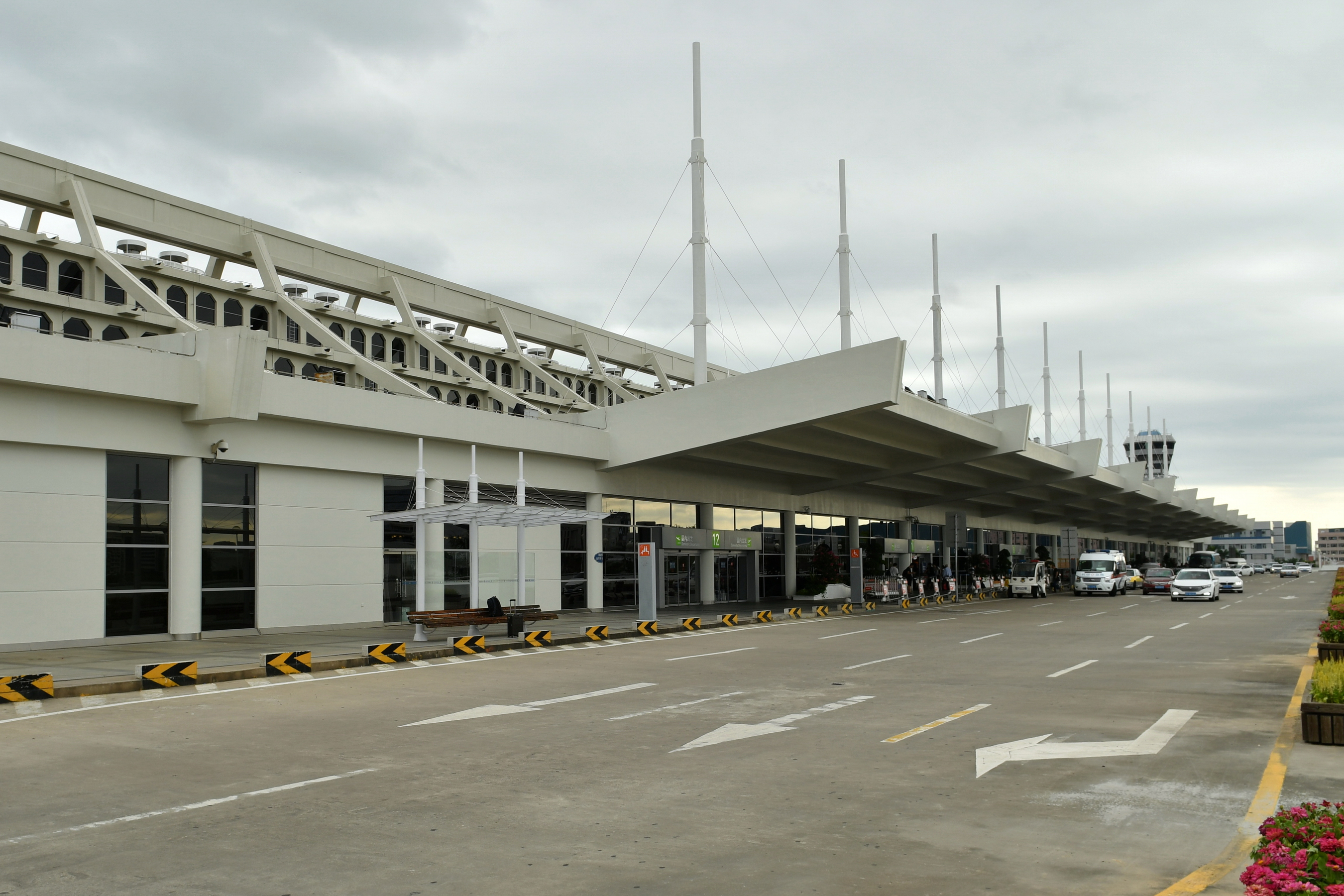 厦门高崎国际机场T3航站楼出发层